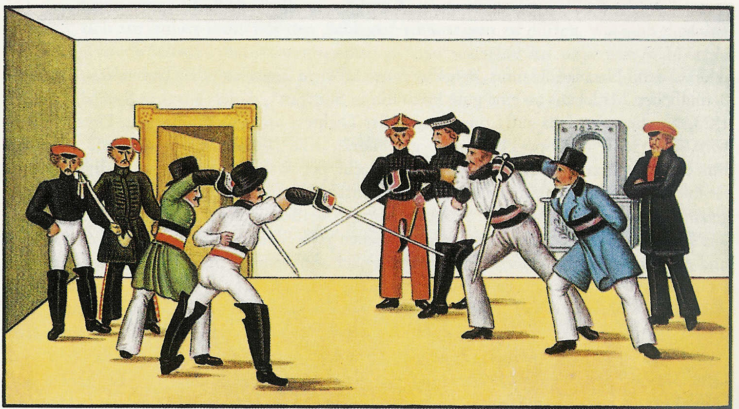 Tübinger Mensur, ein Mitglied des Corps Suevia (II) (links, Farben schwarz-weiß-rot) gegen einen Burschenschafter (rechts, Farben schwarz-rot-schwarz), Stammbuchblatt 1822 Academic fencing in Tübingen/Germany in 1822, a member of the Corps Suevia (II) (left, colours black-white-red) against a Burschenschaft member (right, colours black-red-black)